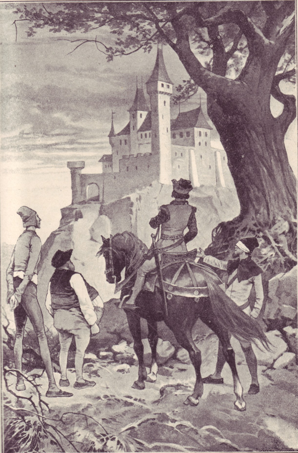 Ilustrace Věnceslava Černého (1865-1936) k pohádce Dlouhý, Široký a Bystrozraký z knihy K. J. Erbena (1811-1870) Báje a pověsti slovanské. Kniha bez vročení, ale předslov napsán v roce 1901 (jediné uvedené datum v knize). Dle katalogu nkp.cz vydáno v roce 1902.